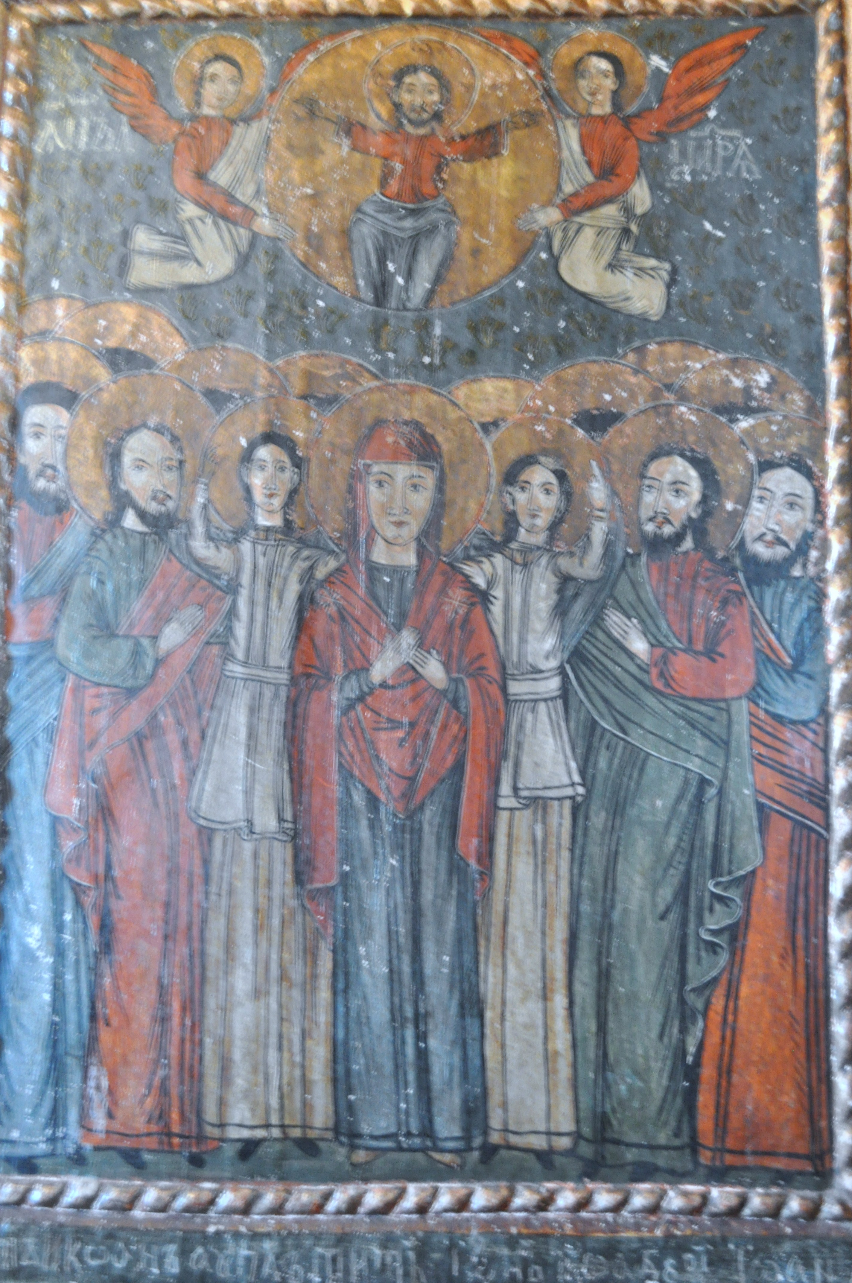 Biserica de lemn din Dealu Negru, județul Cluj